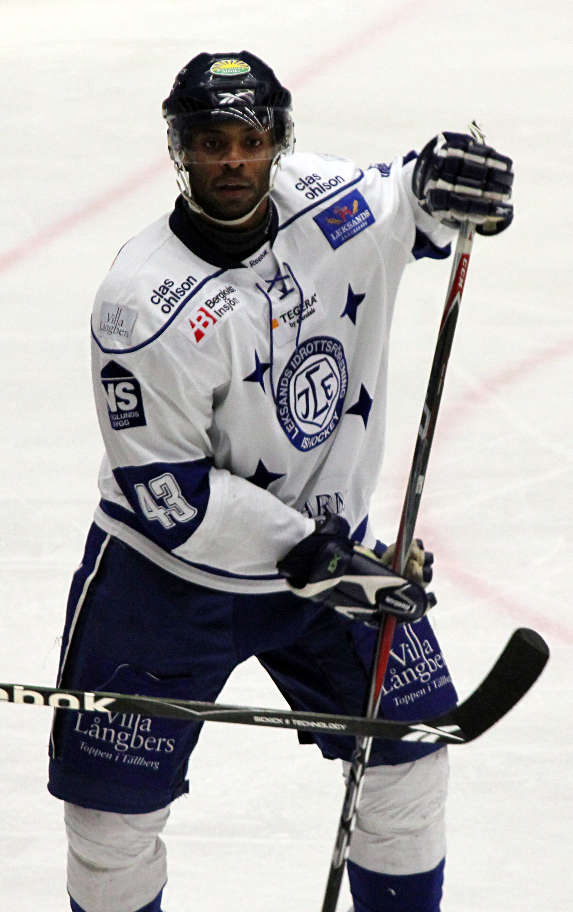 Jean-Luc Grand-Pierre för Leksands IF mot Västerås IK 29 januari 2011.